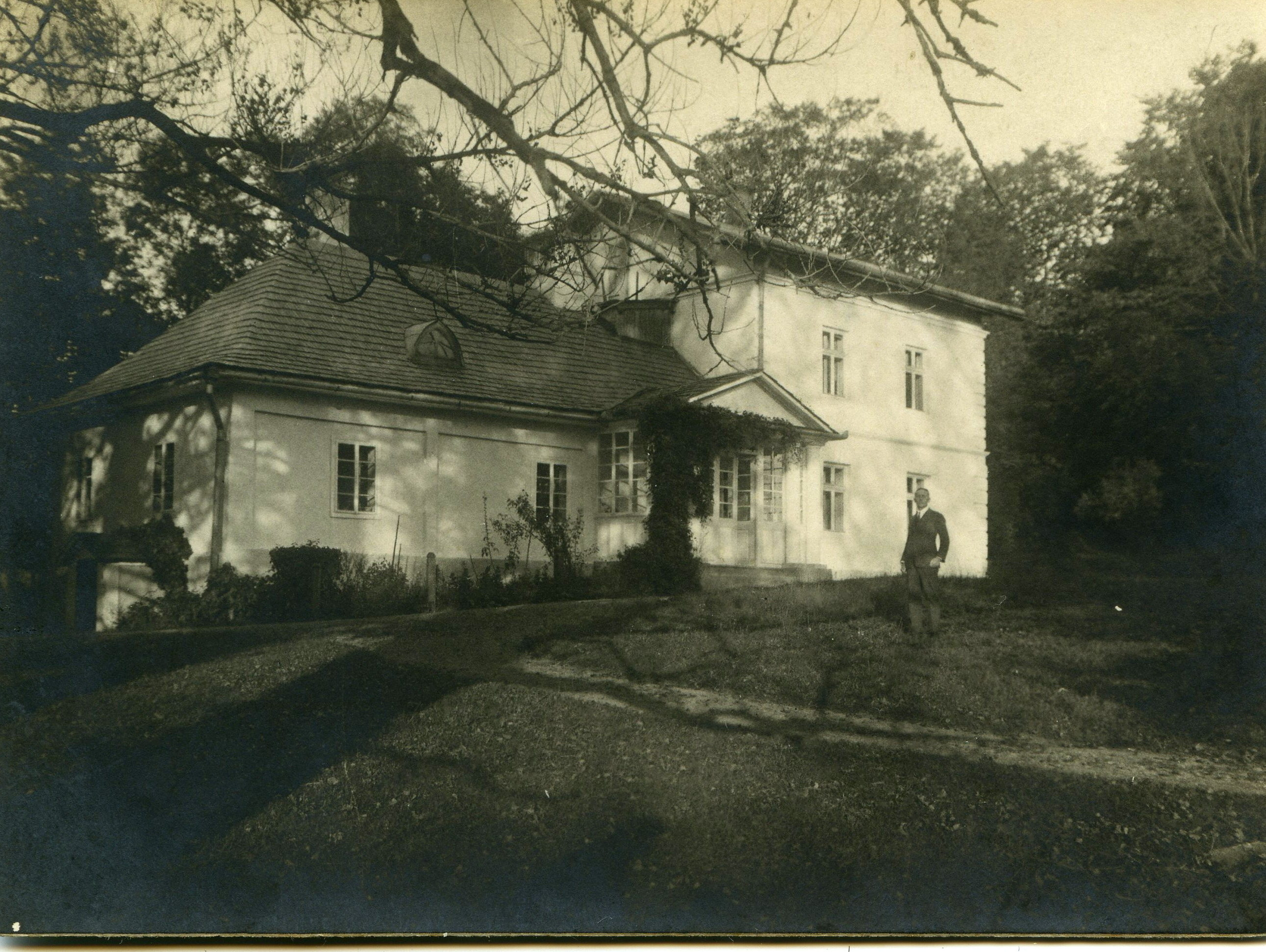 Ladzin near Rymanów in Poland, property of Ostaszewski family